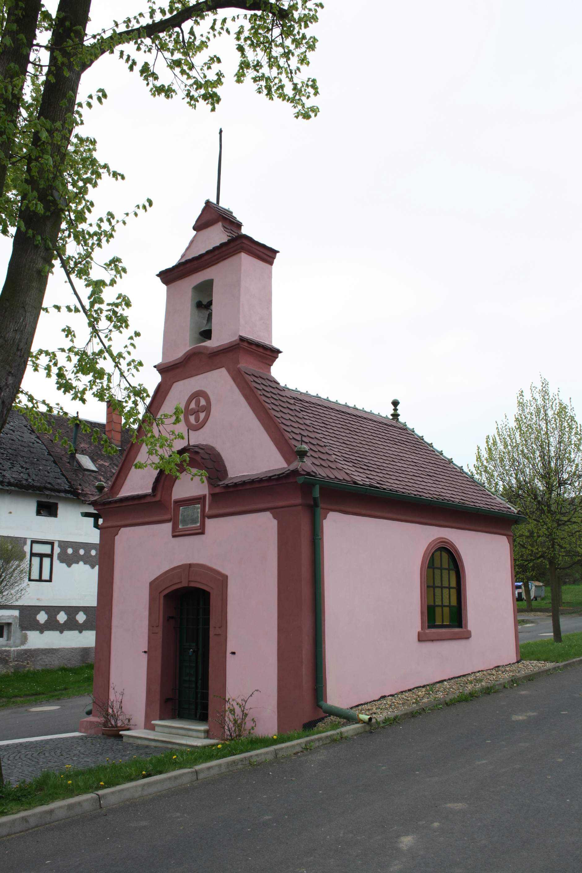 Kaplička na návsi v Chotiněvsi (pohled od severovýchodu).